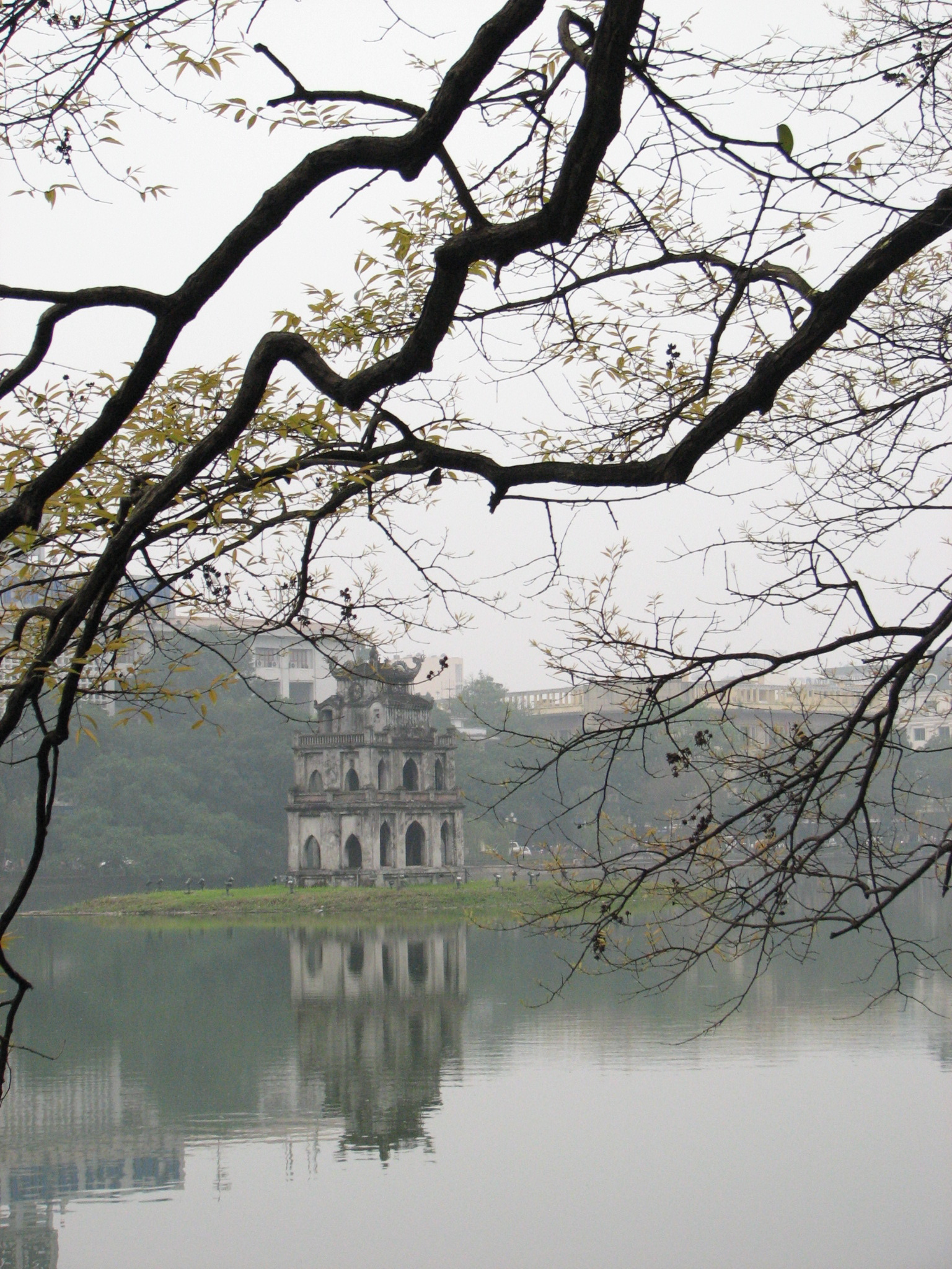 Tháp Rùa giữa hồ Hoàn Kiếm